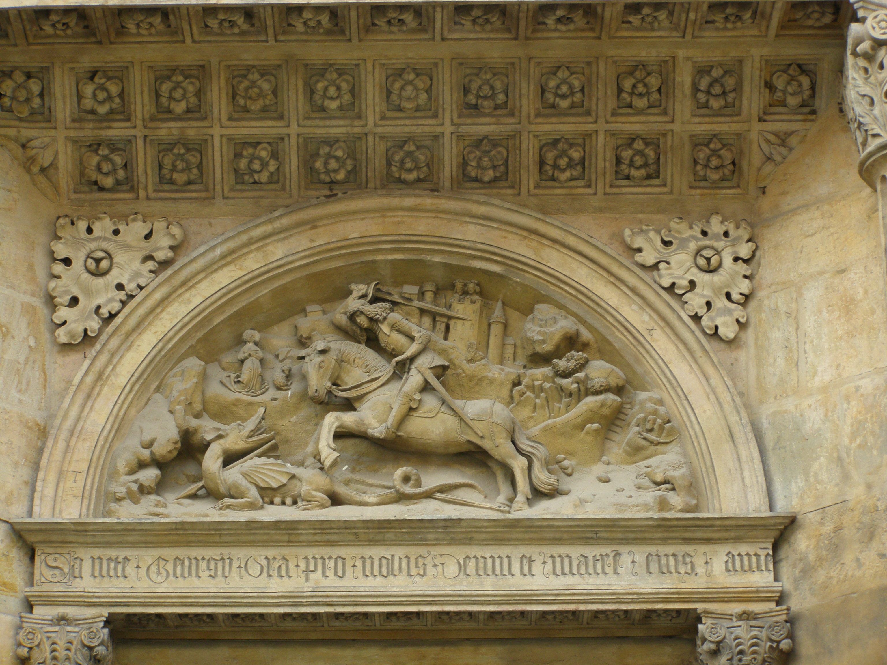 Tympanon s vyobrazením sv. Jiří nad jižním vchodem Baziliky svatého Jiří na Pražském hradě